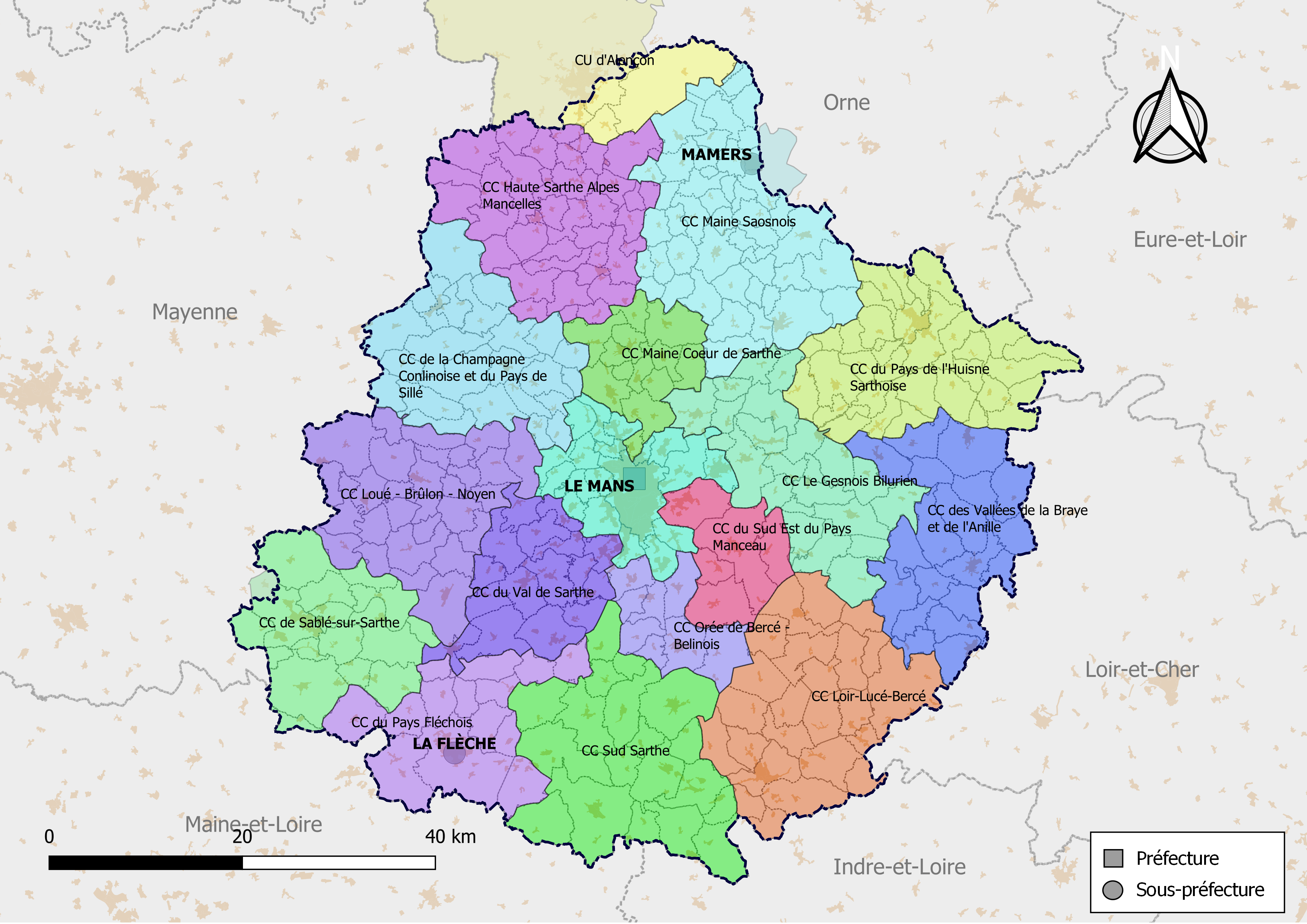 Carte des intercommunalités du département de la Sarthe, France. Composition au 1er janvier 2019.